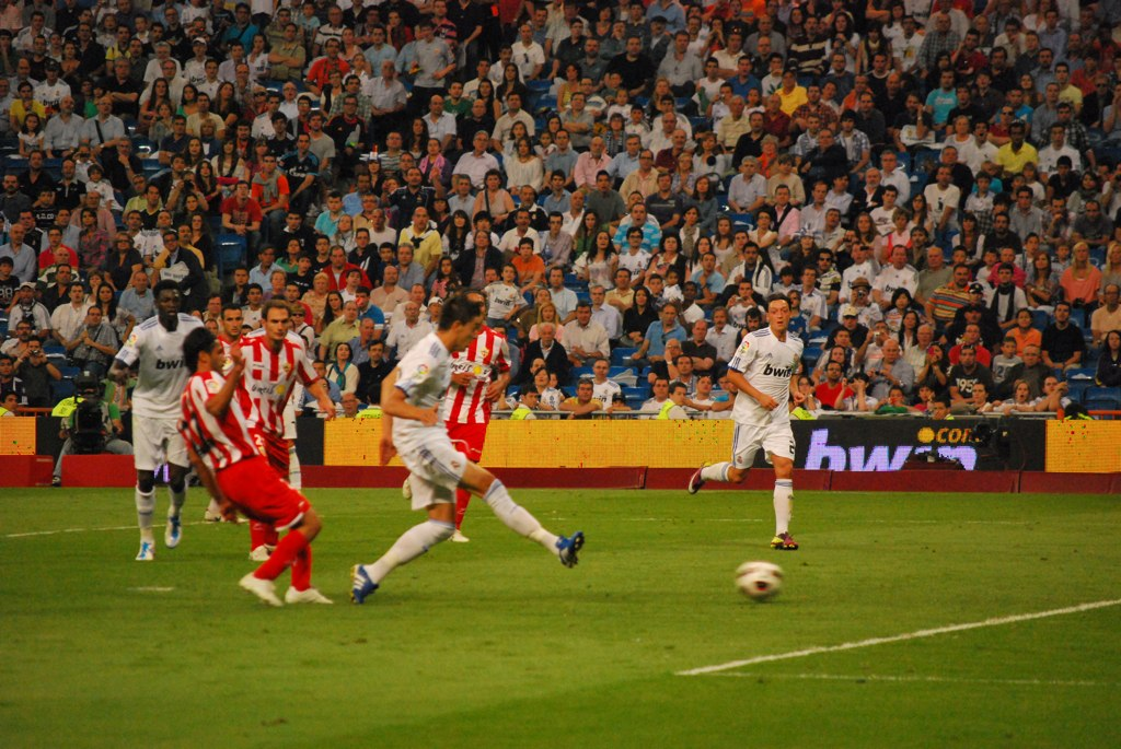 Joselu marquant un but lors d'un match entre le Real Madrid et l'UD Almería.